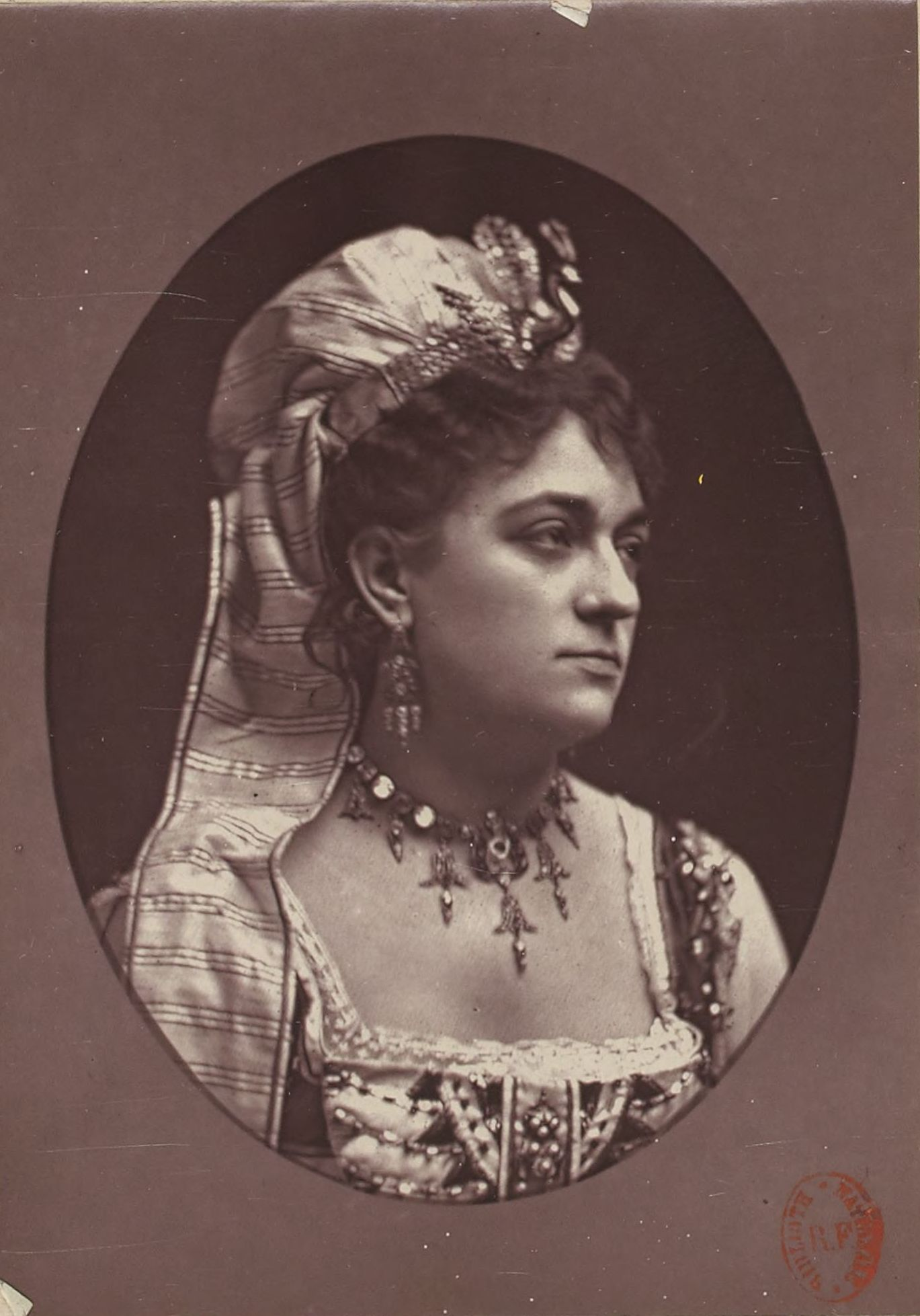 Portrait d'Anna Van Ghell par Gaston et Mathieu , paru dans "Paris-théâtre" du 24 décembre 1874